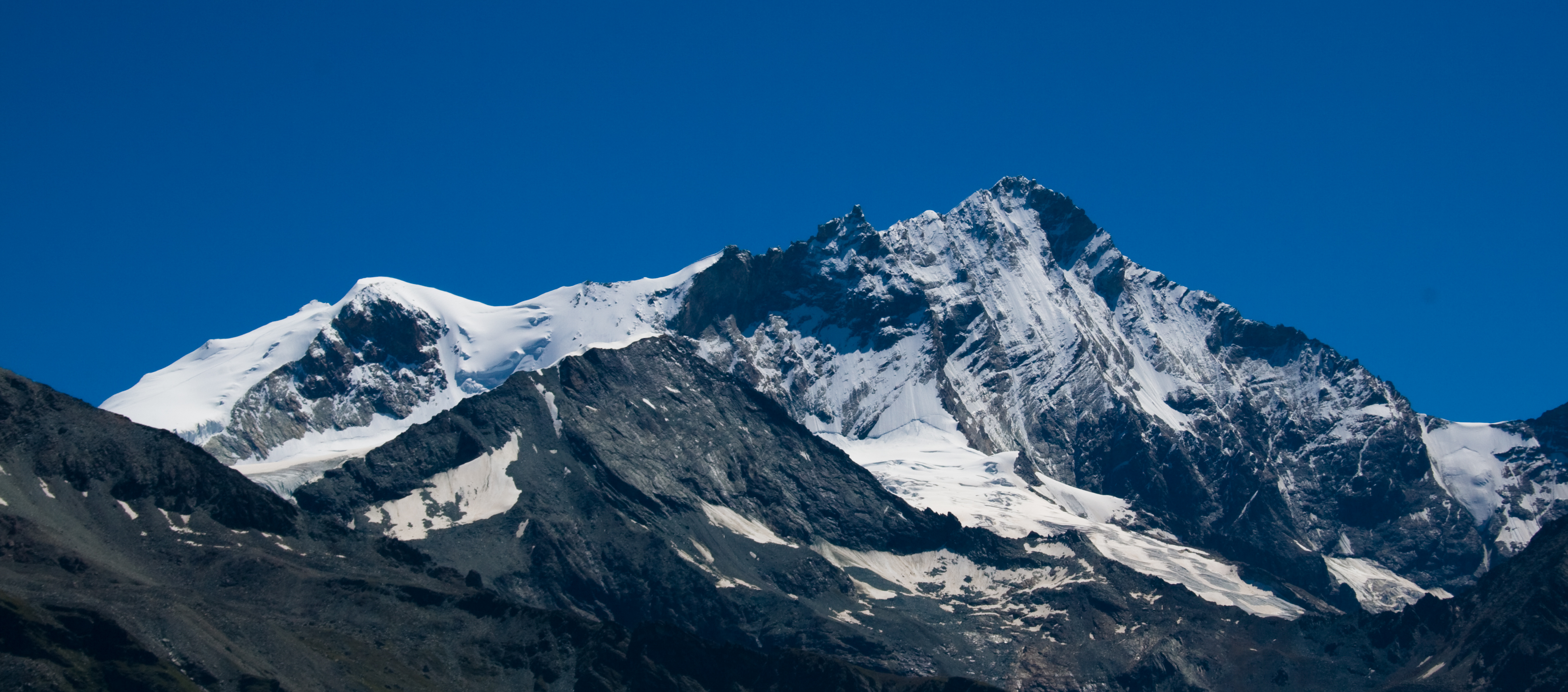 Le Bishorn (à gauche) et le Weisshorn (à droite) dans les Alpes Valaisannes